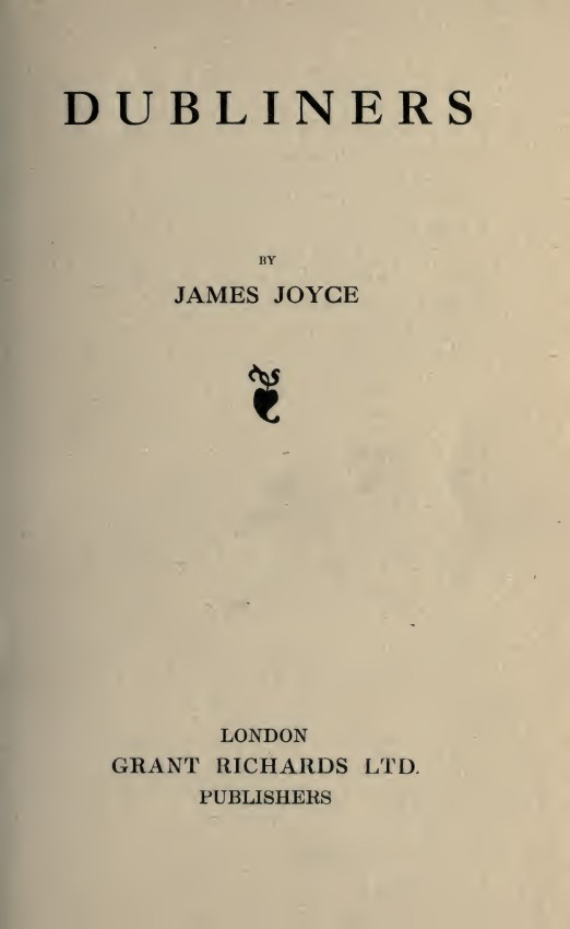 Dubliners / by James Joyce. - London : Grant Richards, 1914. - 278 p. ; 20 cm. Frontespizio